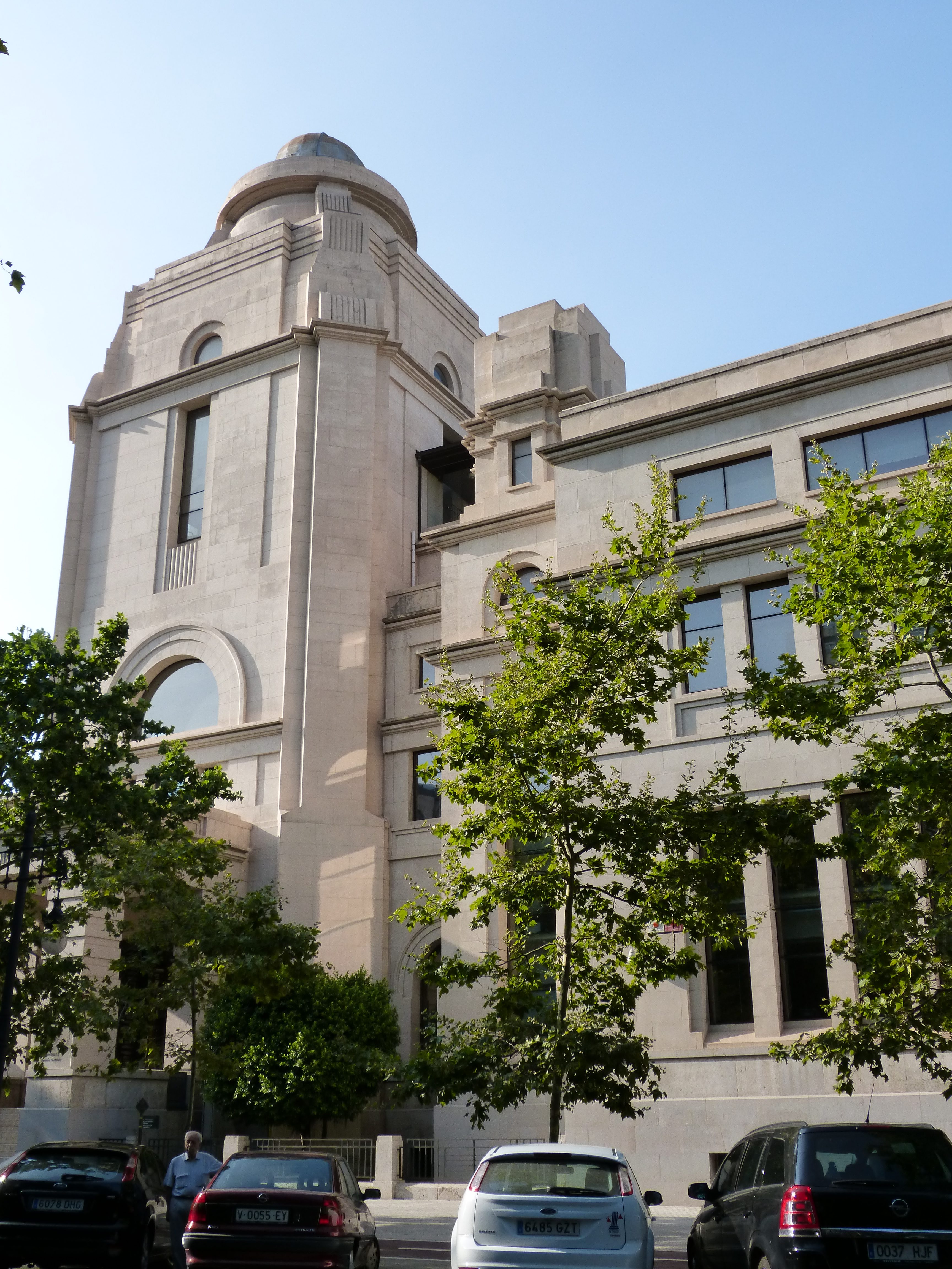 Edificio situado en la Avenida de Blasco Ibáñez (antiguo Paseo Valencia al mar)